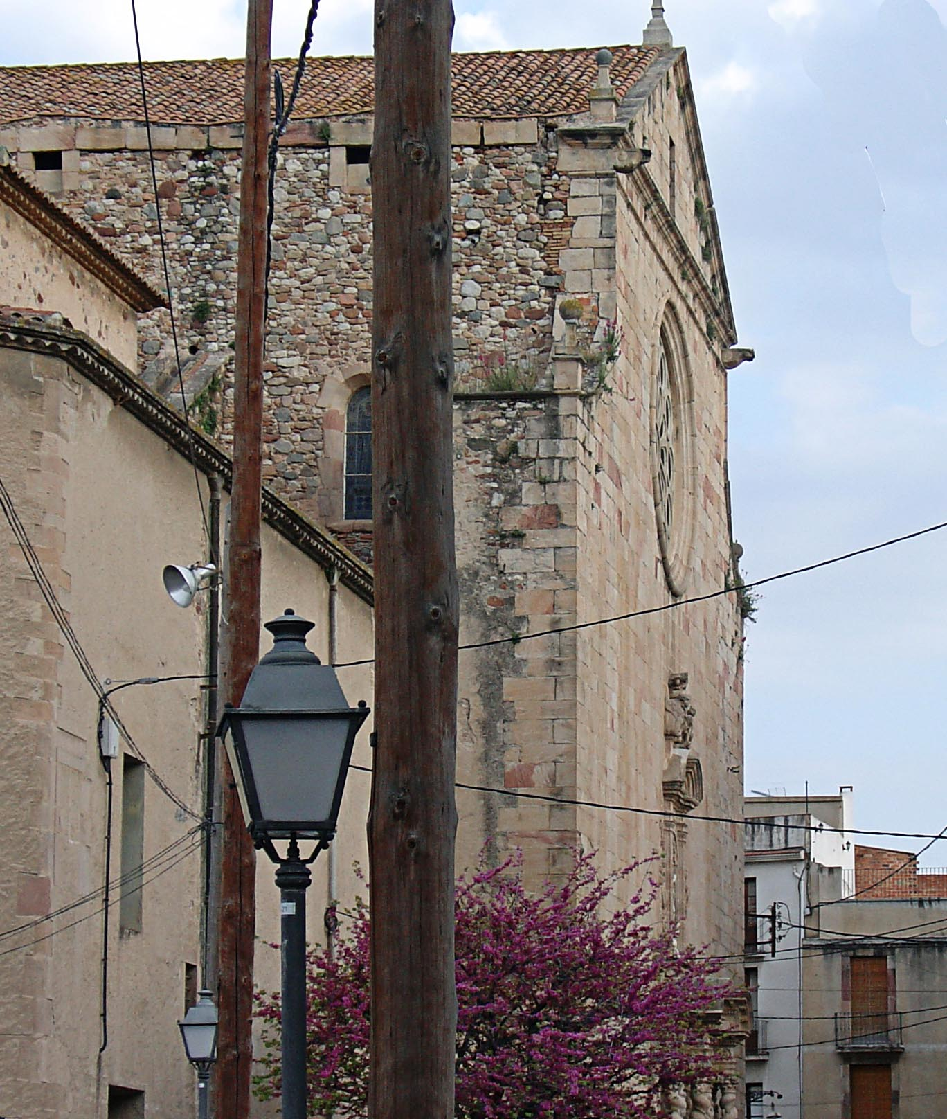 Caldes de Montbui church